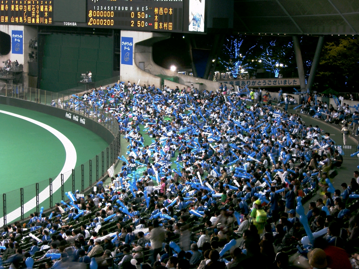 “Seibu Dome” Seibu Lions professional baseball team located in Tokorozawa, Saitama, Japan. “西武ドーム” 日本の埼玉県所沢市にあるドーム式野球場。日本のプロ野球パリーグに加盟する、西武ライオンズのホーム球場でもある。西武ライオンズ対横浜ベイスターズ・セパ交流戦第1試合で西武2,横浜1で西武の勝利。7回裏ラッキーセブンのジェット風船での応援タイム。外野席から撮影。